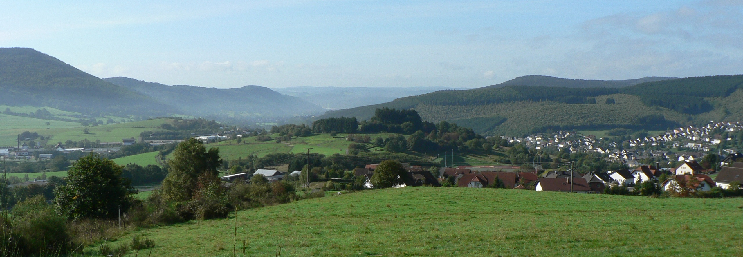 Eibelshausen mit seinem "Hausberg", dem Holderberg (in der Bildmitte). Eigenes Foto.